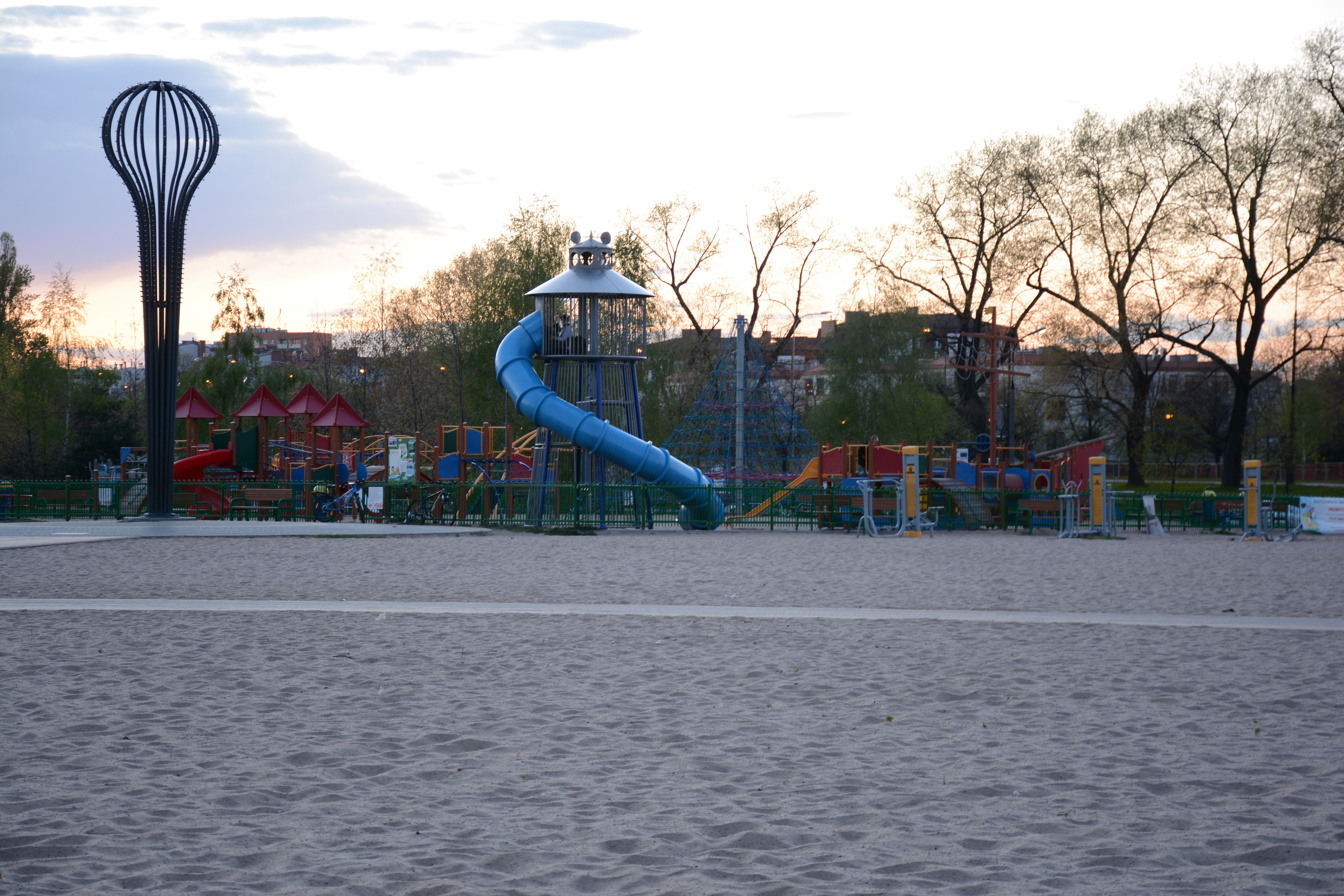 Błonia Wilanowskie, Warszawa, Poland